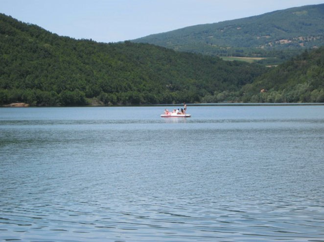 Bovansko jezero